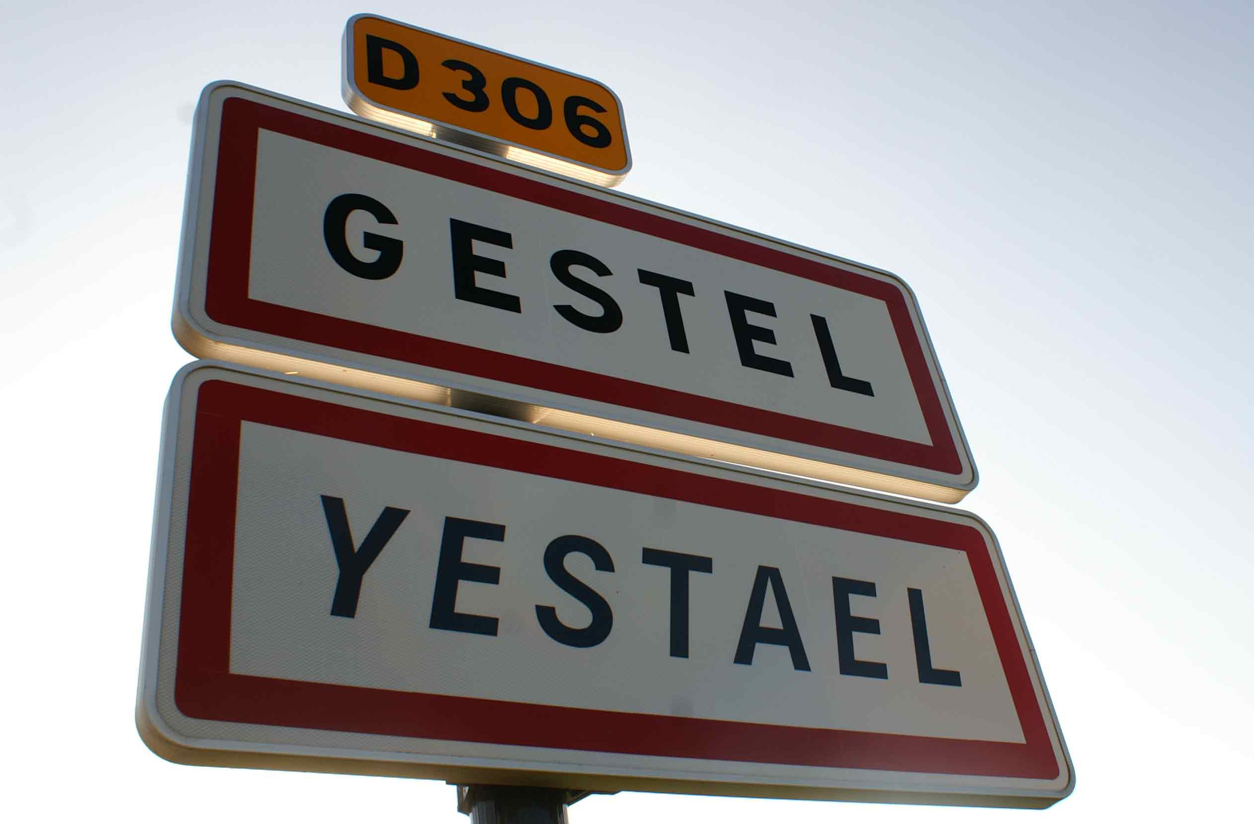 Panneau bilingue de l'entrée de Gestel, Yestael en breton.